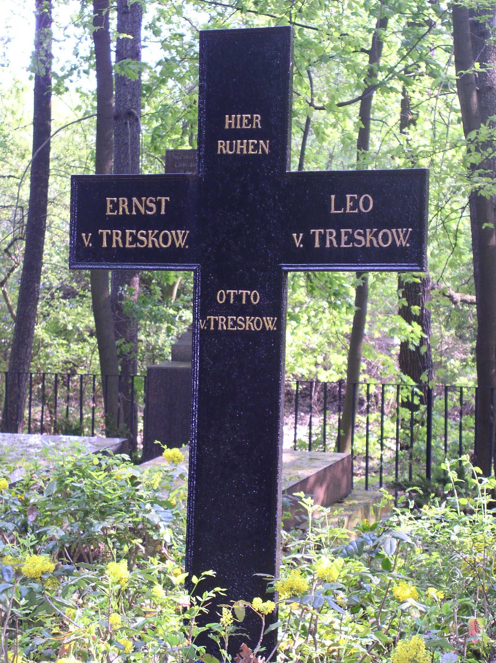 Graveyard Erbbegräbnisstätte der Familie von Treskow-Friedrichsfelde at the Tierpark Berlin